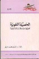 الحصيلة اللغوية: أهميتها، مصادرها، وسائل تنميتها